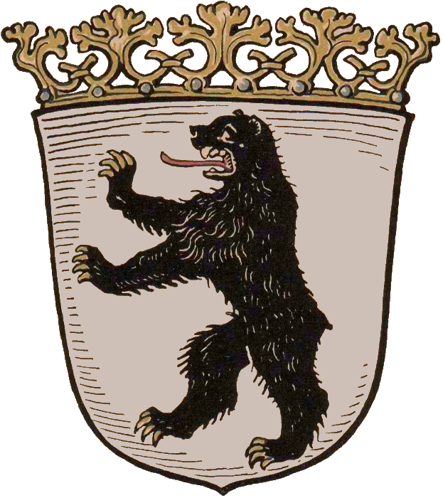 Wappen der Stadt Groß-Berlin von 1920-1935